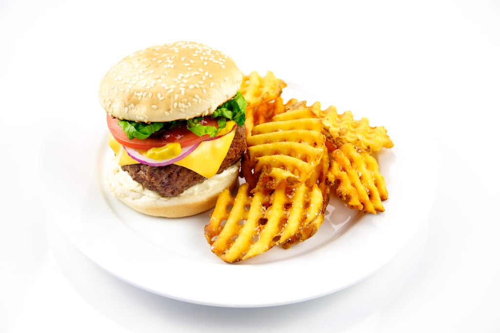 Cheeseburger with Fries